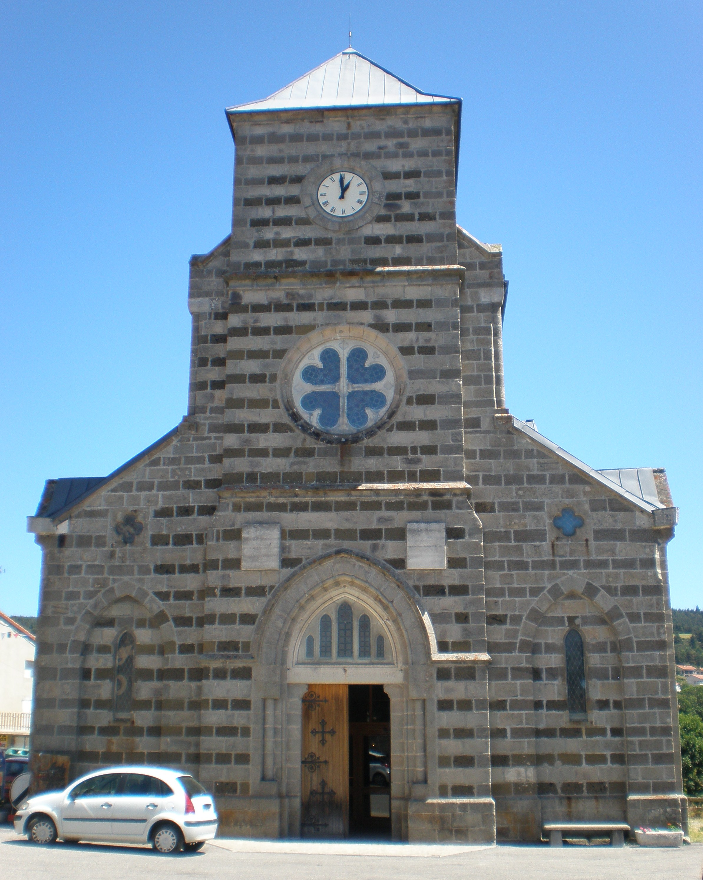 L'église Saint-Étienne de Saint-Étienne-de-Lugdarès (Ardèche, 07)